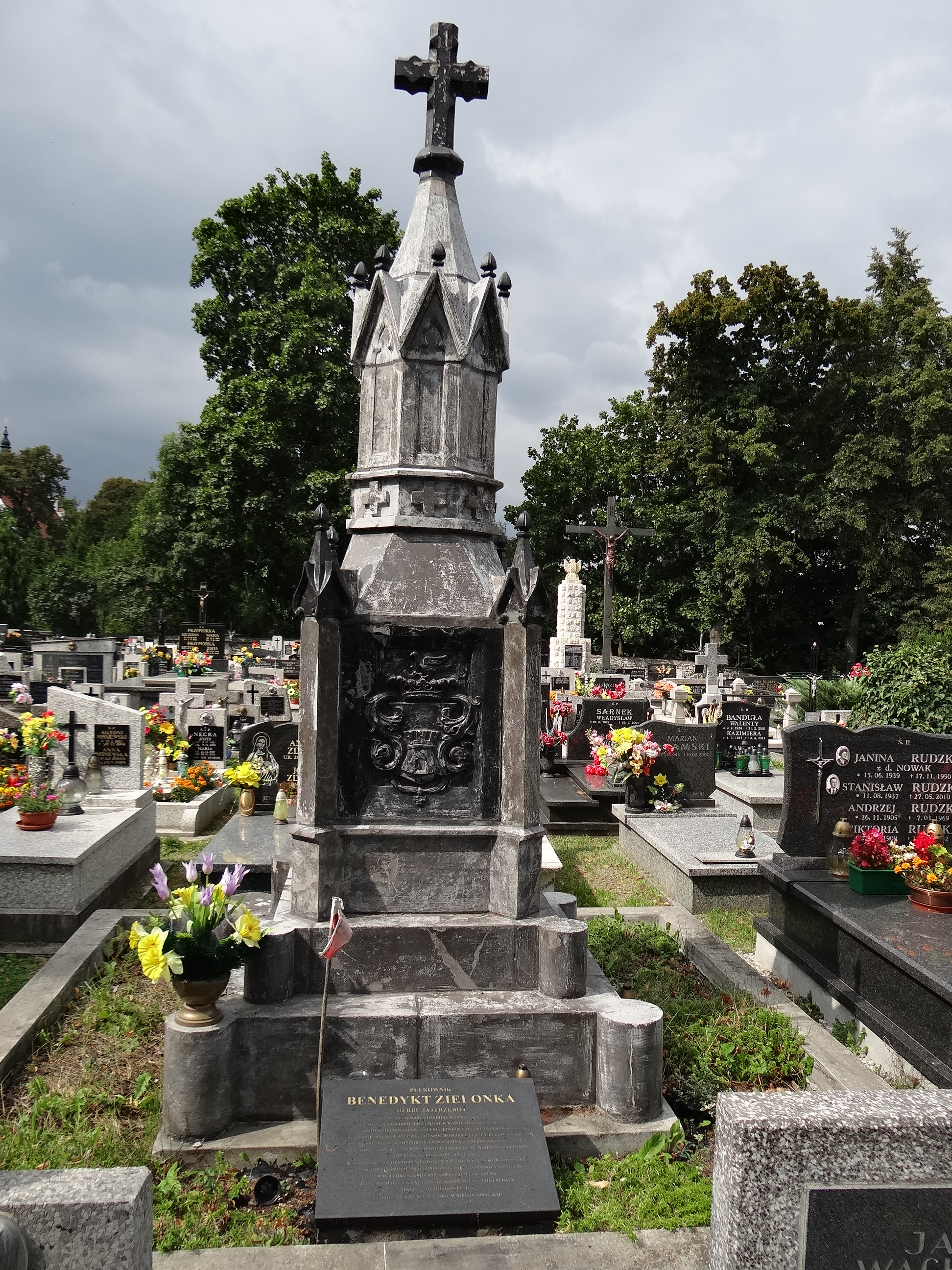 Rudawa cmentarz. Pomnik nagrobny Benedykta Zielonki.